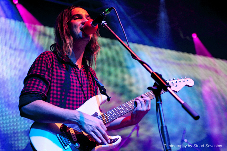 Tame Impala @ Metropolis Fremantle (27/5/2010)